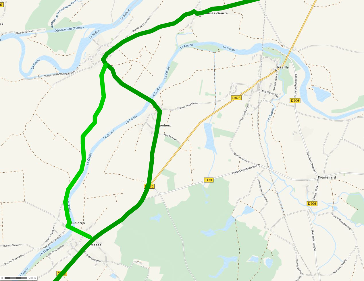 Karte der Römerstraßen in der Bresse - Zweig Charnay-lès-Chalon nach Saunières Carte des voies romaines en Bresse - Branche de Charnay-lès-Chalon à Saunières This map may be incomplete, and may contain errors. Don't rely solely on it for navigation.